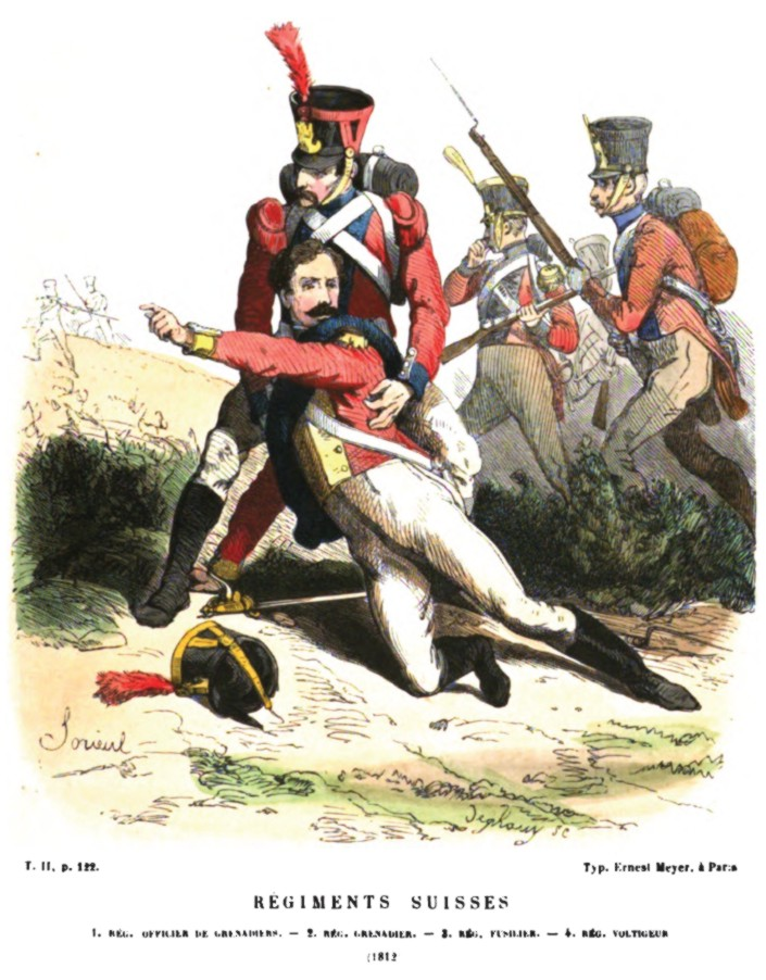 Schweizer Regiment der Grande Armée (um 1810)